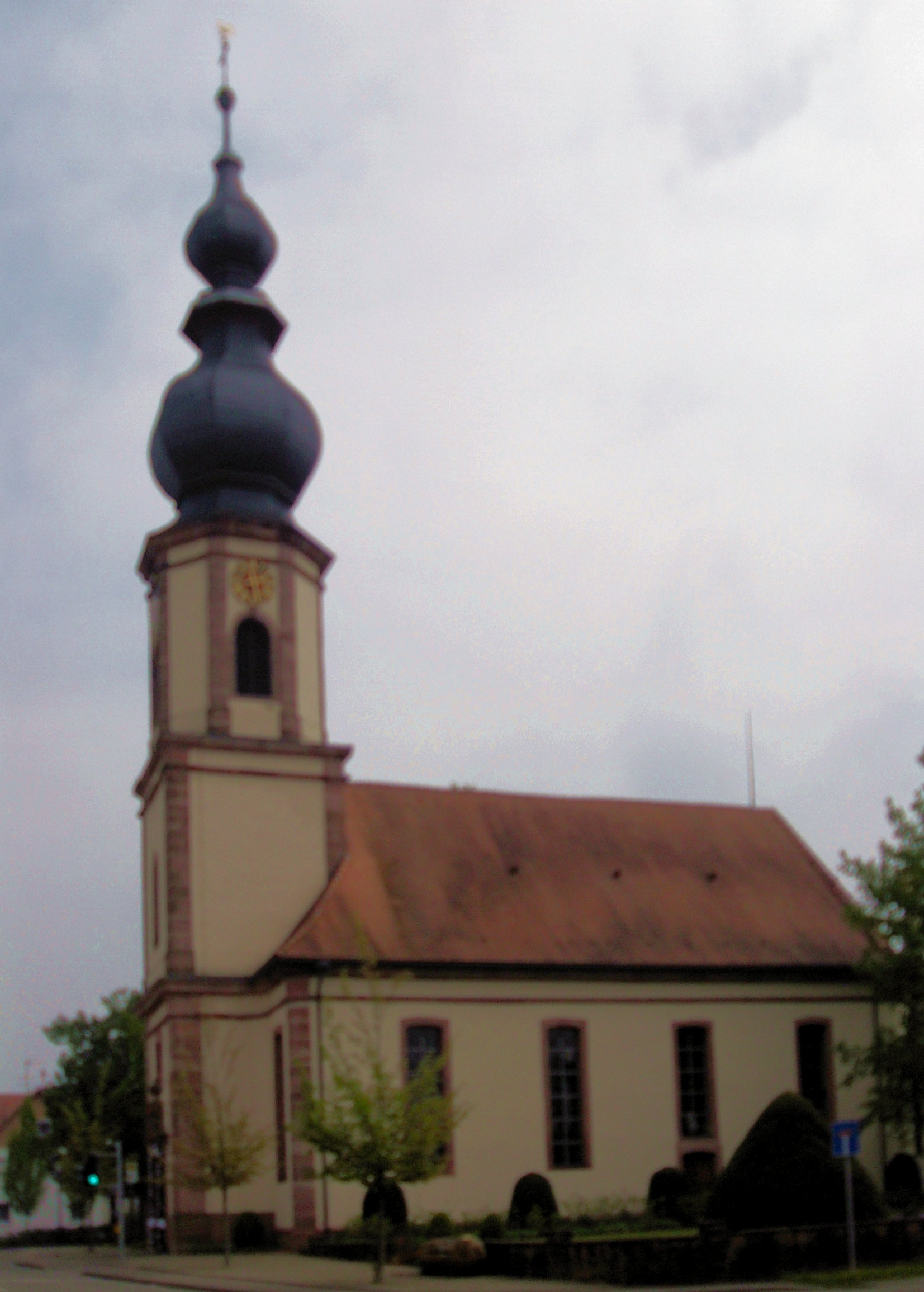 evangelische Kirche in Allmannsweier, Ortenaukreis